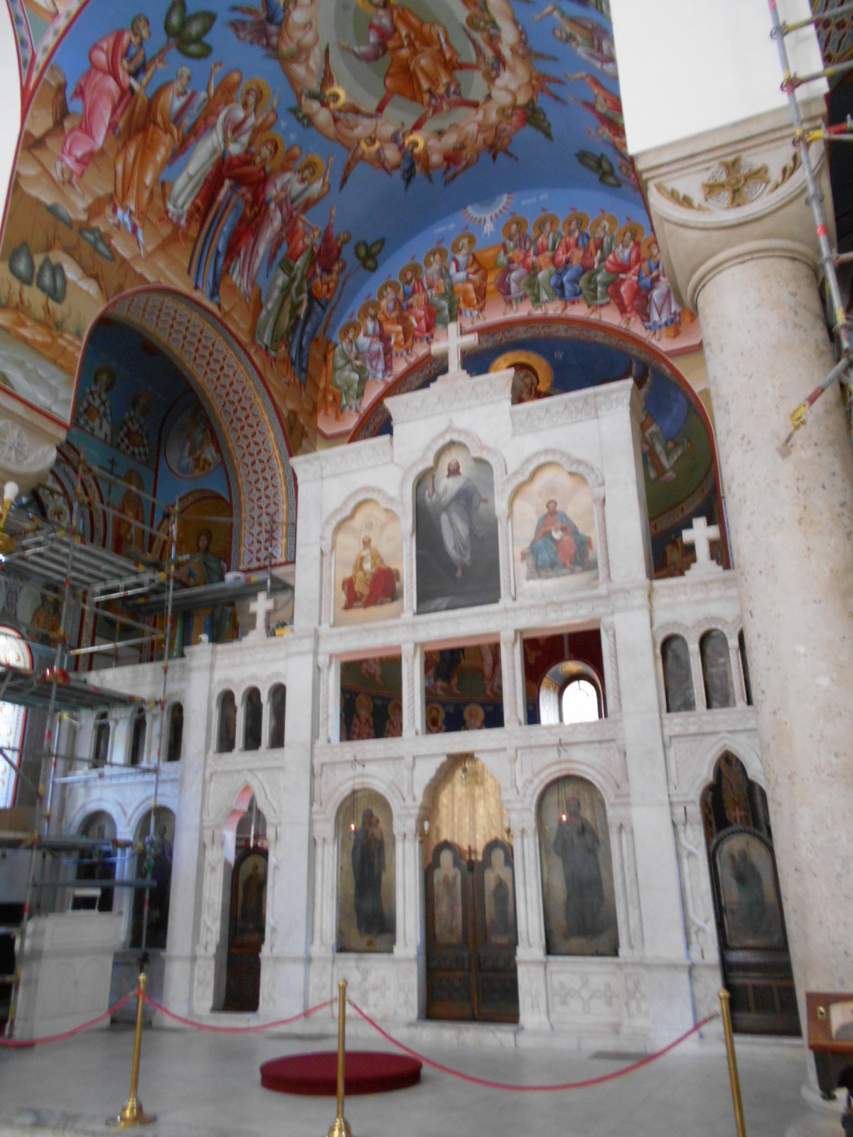 Iconostasi della chiesa di Aleksandr Nevski a Belgrado